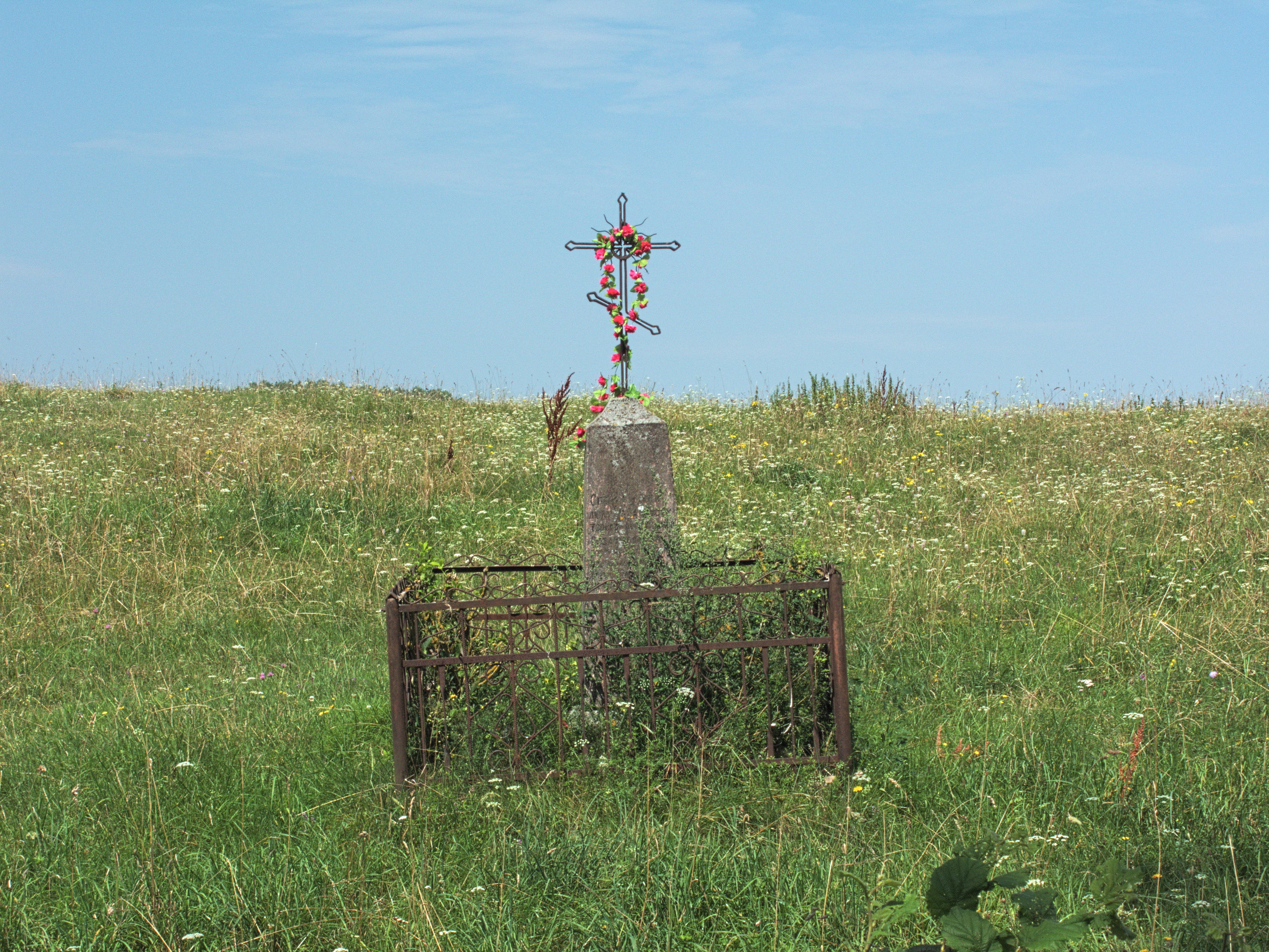 Krzyż wotywny stojący w sąsiedztwie cmentarza wojennego w Hryniewiczach Dużych.